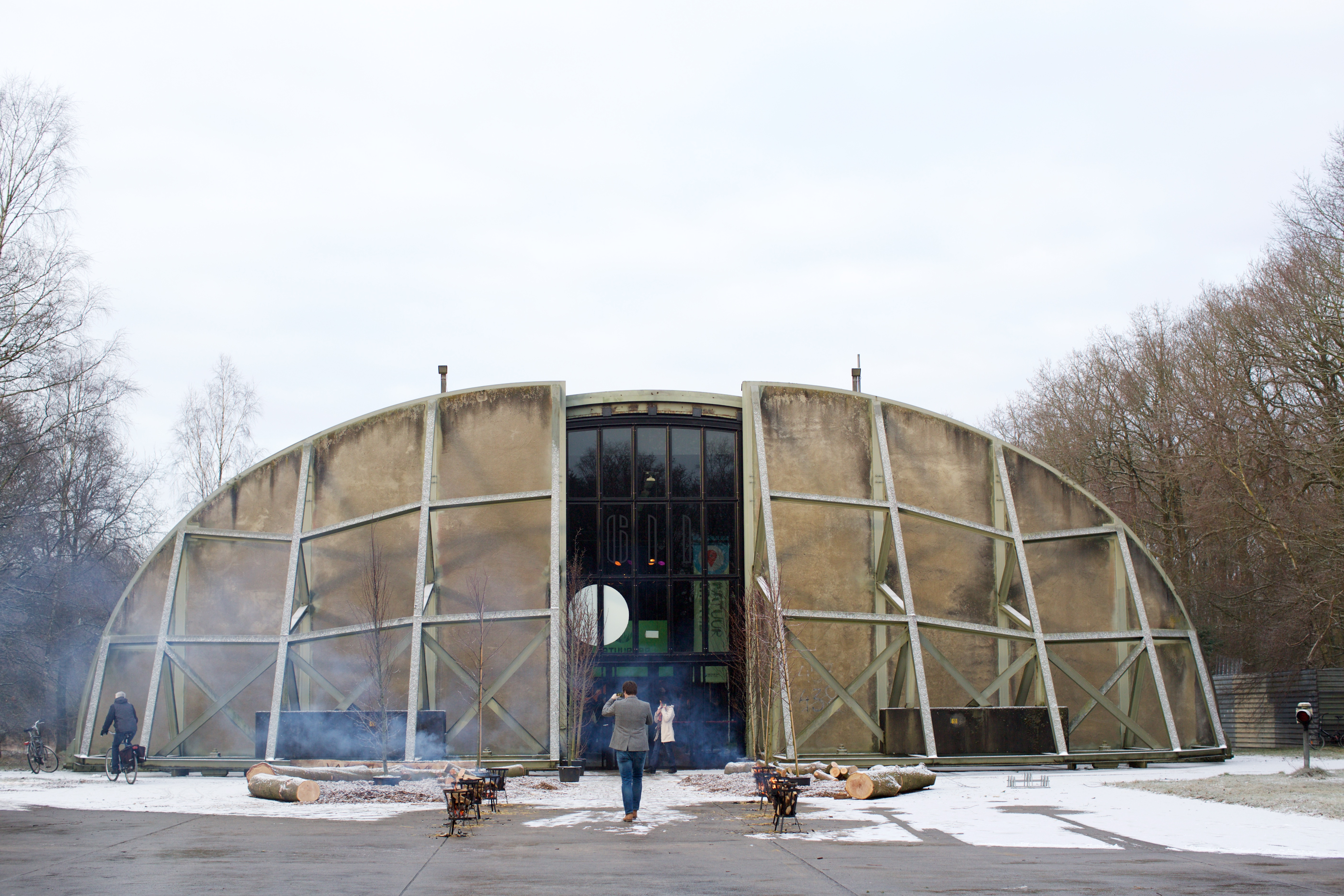 Op 5 februari 2015 vond de Natuurtop 2015 plaats, een bijeenkomst vol ‘inhoudelijke’ bedrijvigheid waar ervaringen en kennis werden uitgewisseld, inspiratie werd opgedaan en verbindingen werden gelegd tussen bestuurders en beleidsmedewerkers van Maatschappelijke (natuur) organisaties, bedrijfsleven, provincies en andere overheden.